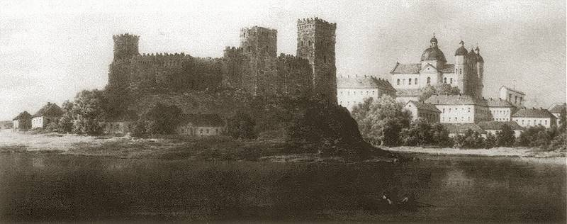 Луцьк